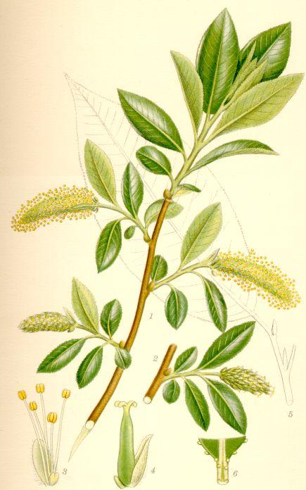 Jolster (Salix pentandra) gren med blad och hanax, o med honax, hanblomma med skärmblad (6/1), honblomma med o (6/1), fullvuxet blad, bladbas (3/1).